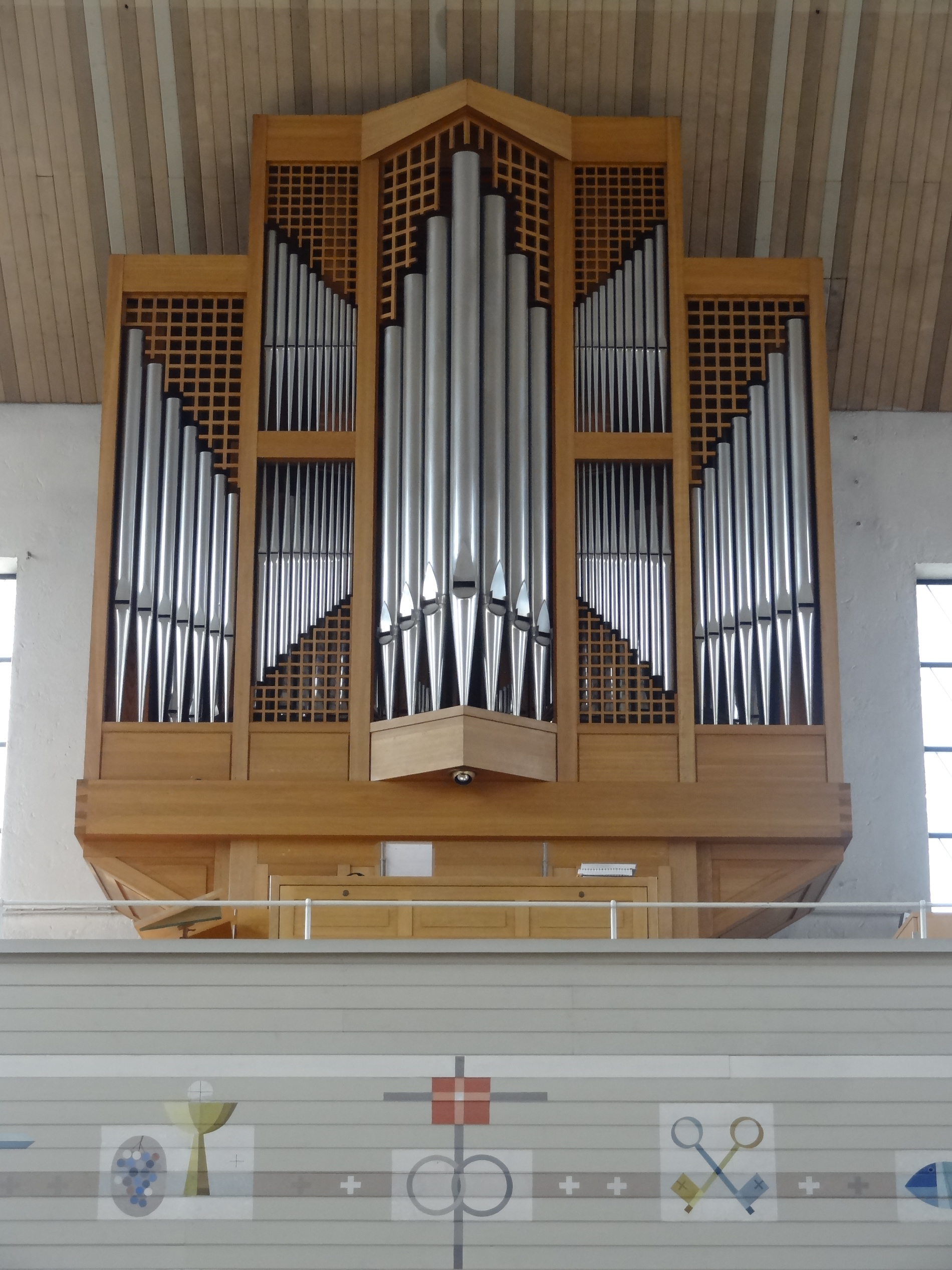 Jann-Orgel (II/P, 18) der Pfarrkirche St. Josef in Niederaichbach (Lkr. Landshut, Bayern)